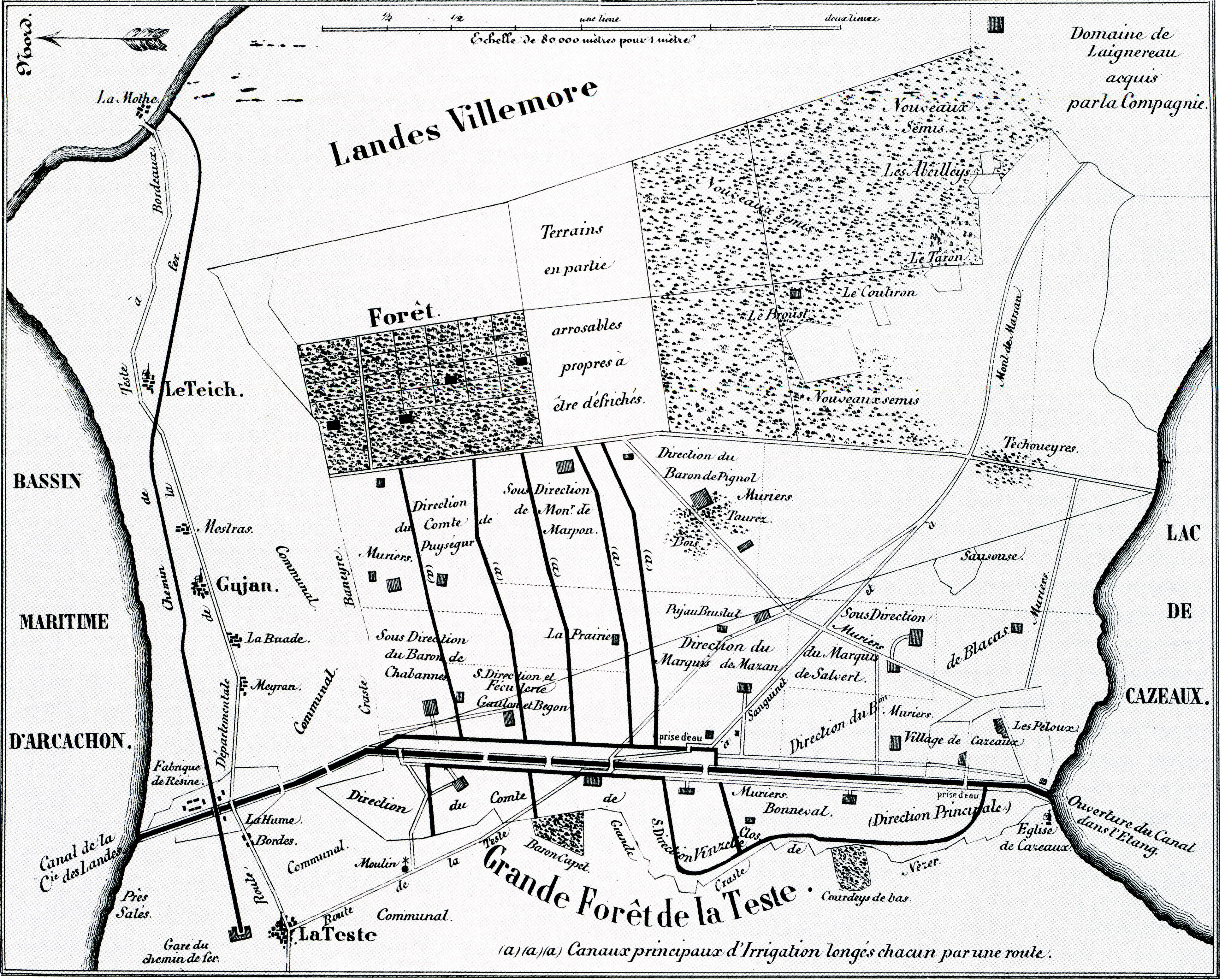 Aménagement de la plaine de Cazaux vers 1850 (France-Aquitaine-Gironde)selon les plans de la Compagnie Agricole et Industrielle d'Arcachon